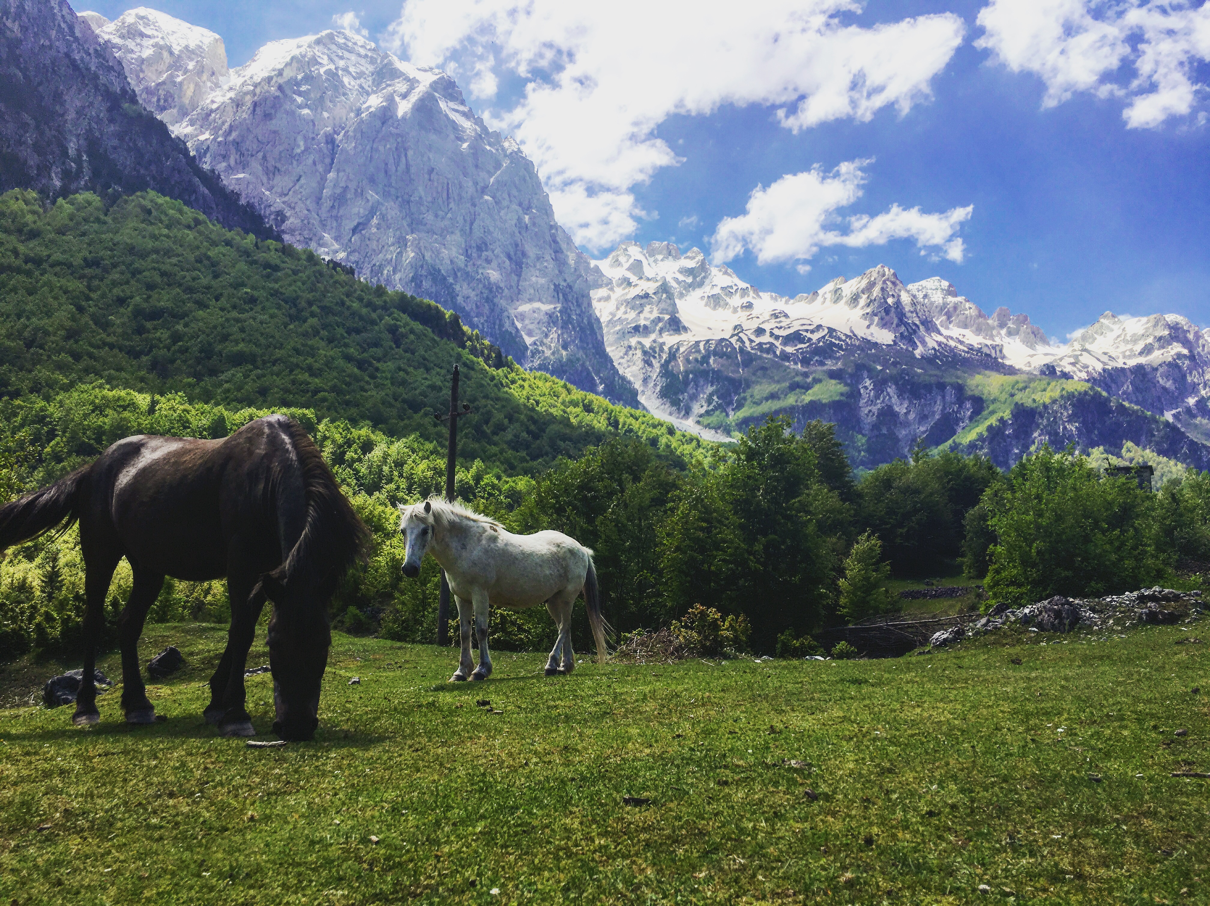 Lugina e Valbones, Tropoje